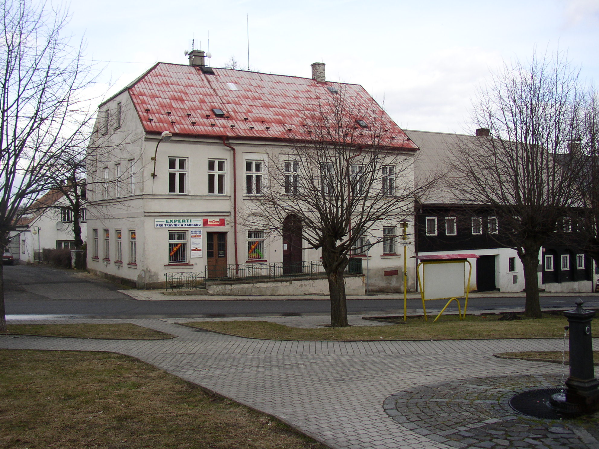 Bývalá lékárna v Jiřetíně pod Jedlovou